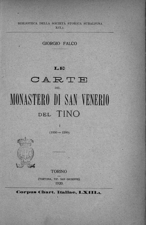 Frontespizio